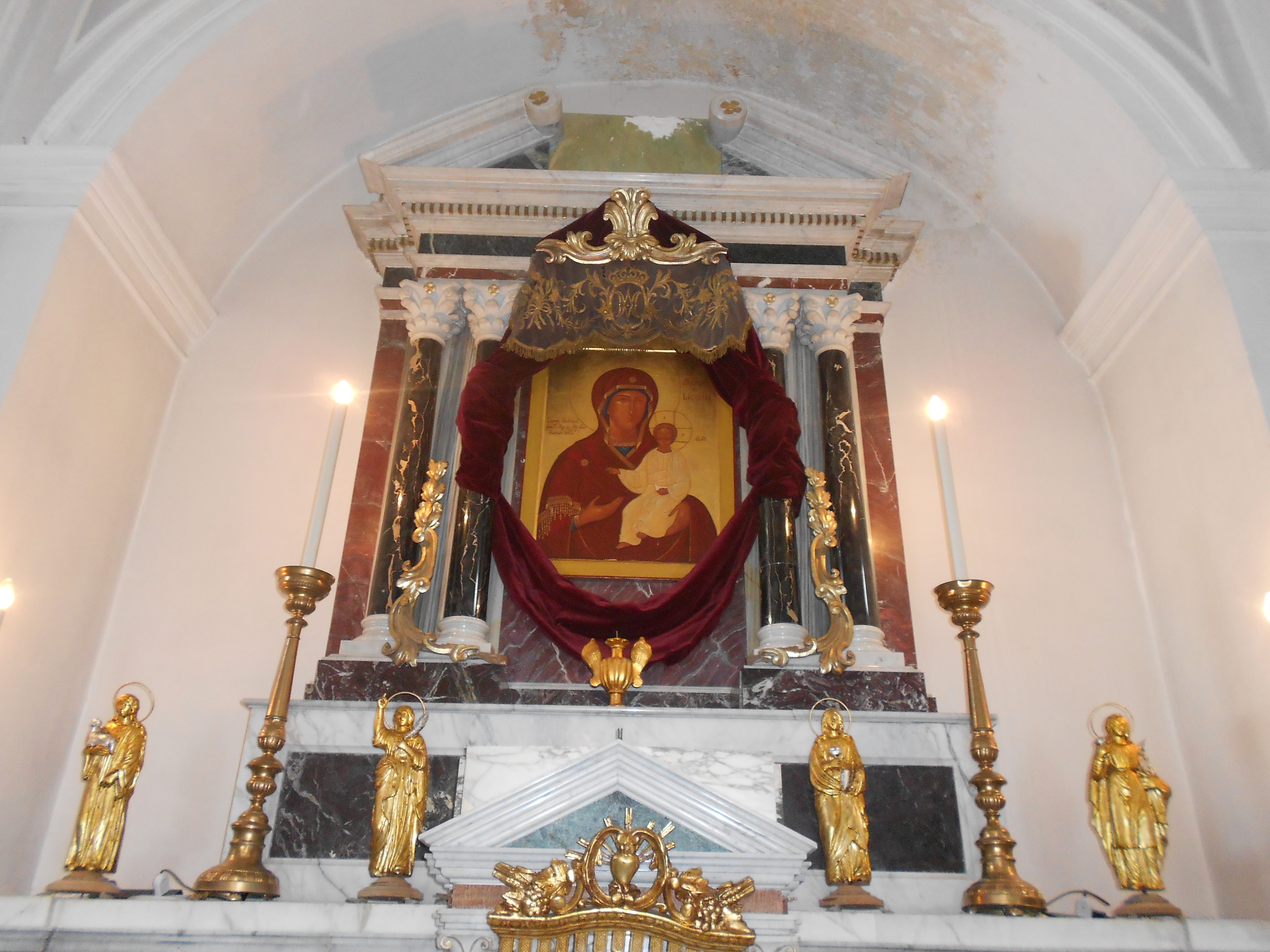 Icona di Santa Maria di Licodia